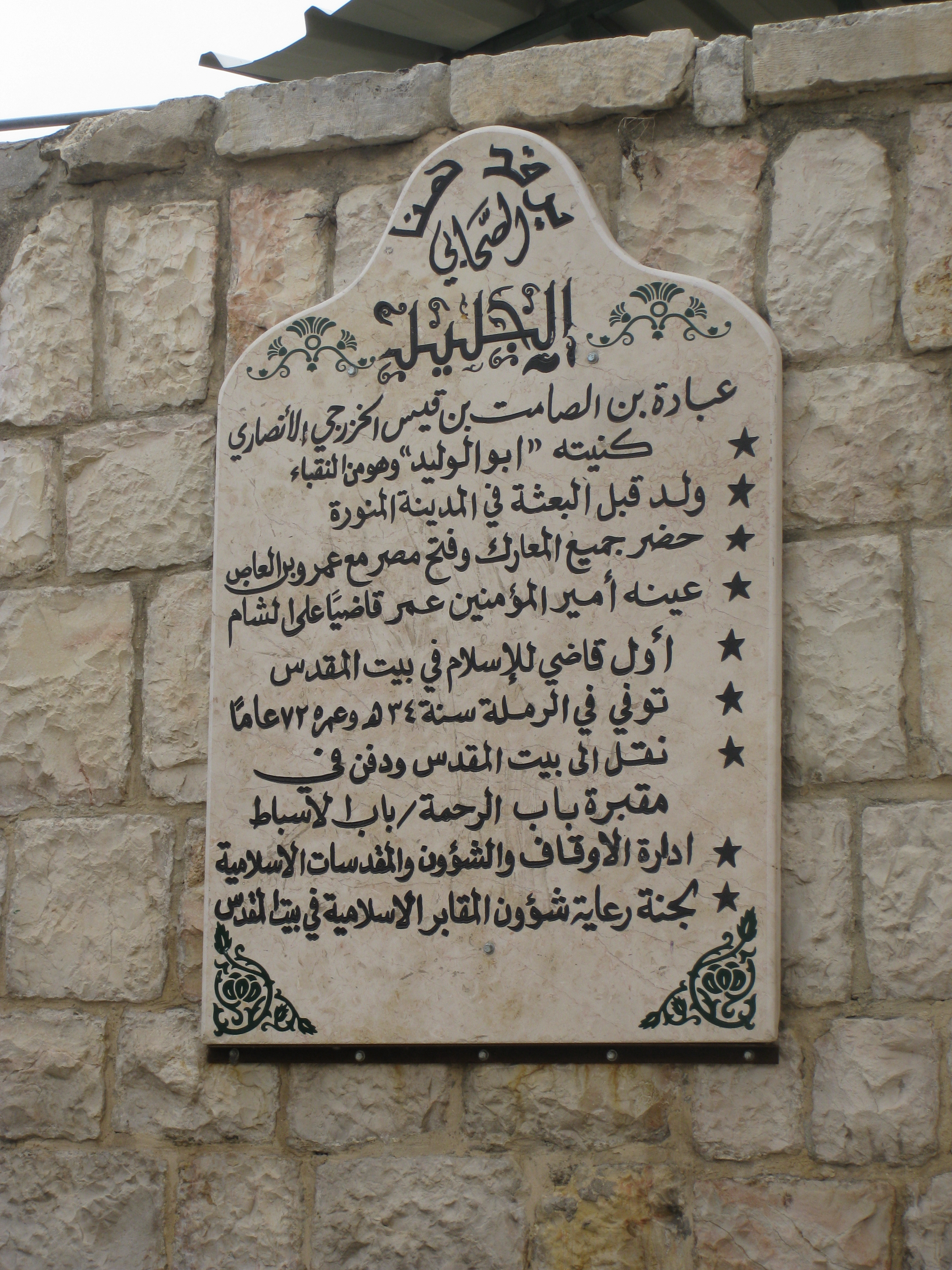 Muslim Quarter הרובע המוסלמי בירושלים בית הקברות הסמוך לשער האריות